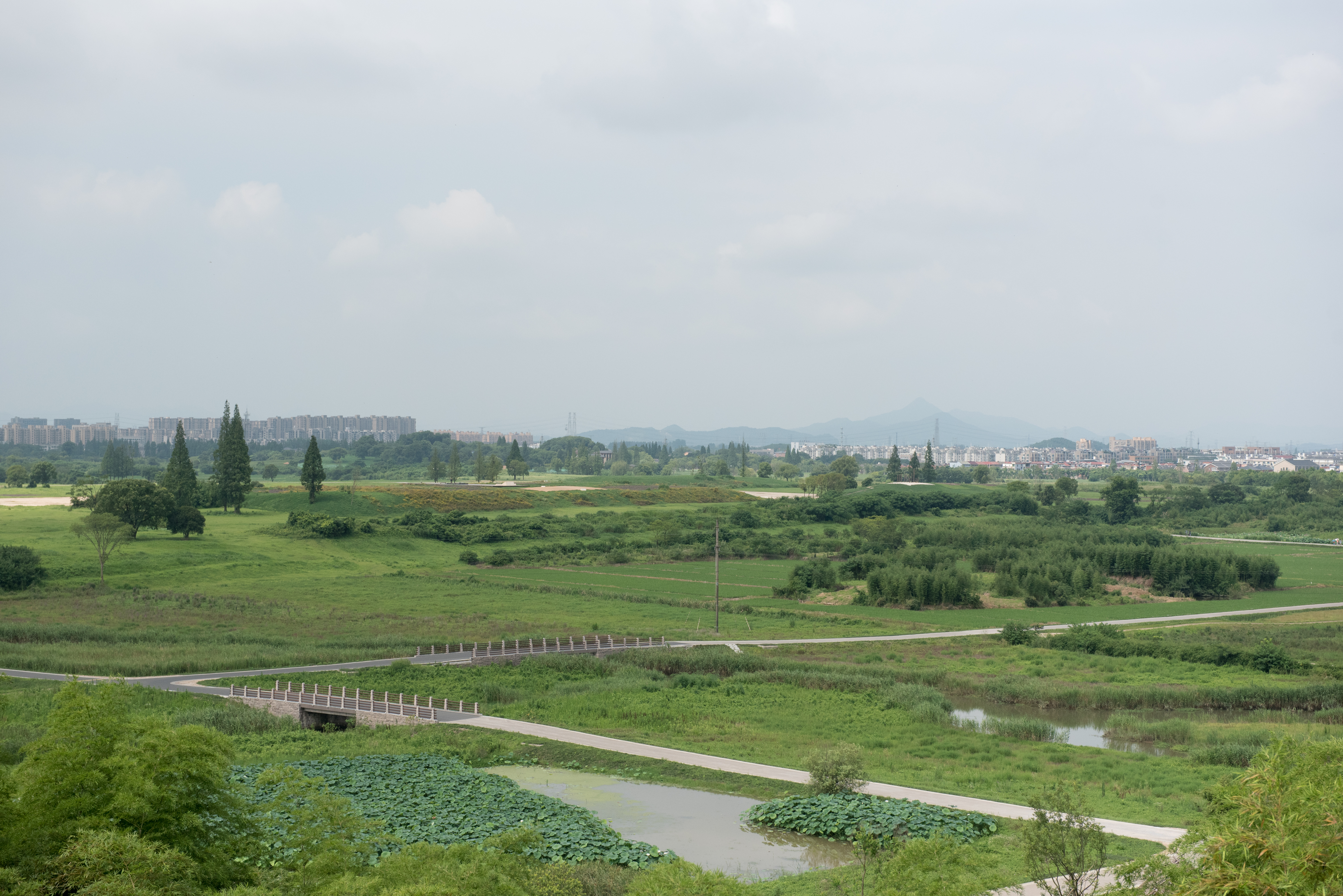 良渚考古遗址公园——莫角山遗址俯瞰